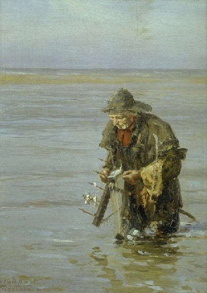 Tableau de Francis Tattegrain représentant un pêcheur à la foëne dans la baie d'Authie - Huile sur bois de 1890 - Boulogne-sur-Mer, Château-Musée